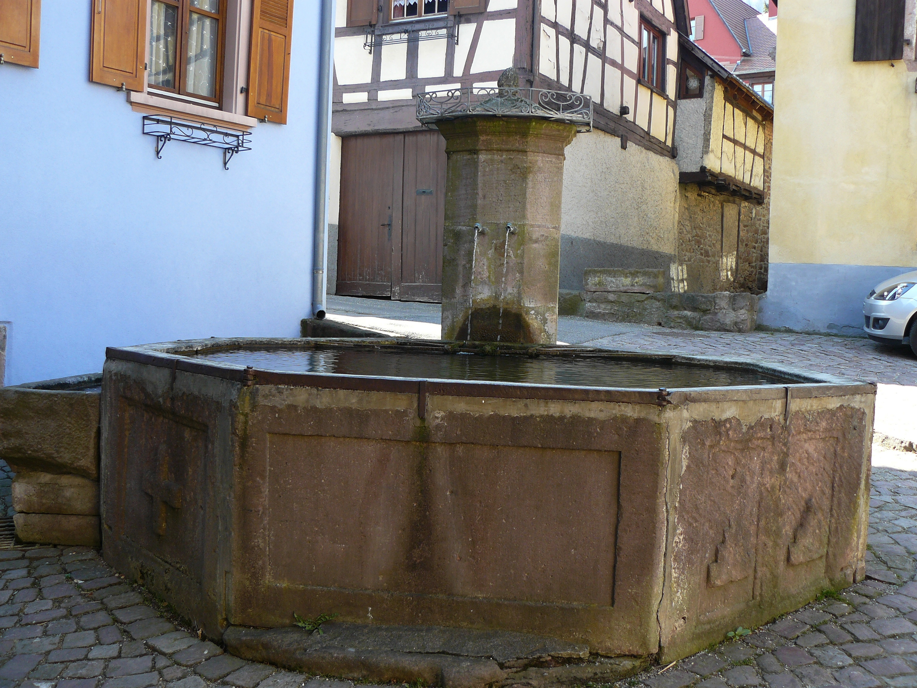 Fontaine, rue de la source, (XVIIIe siècle), Gueberschwihr (Haut-Rhin)